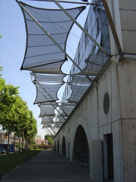 ENSA Lyon coté rue